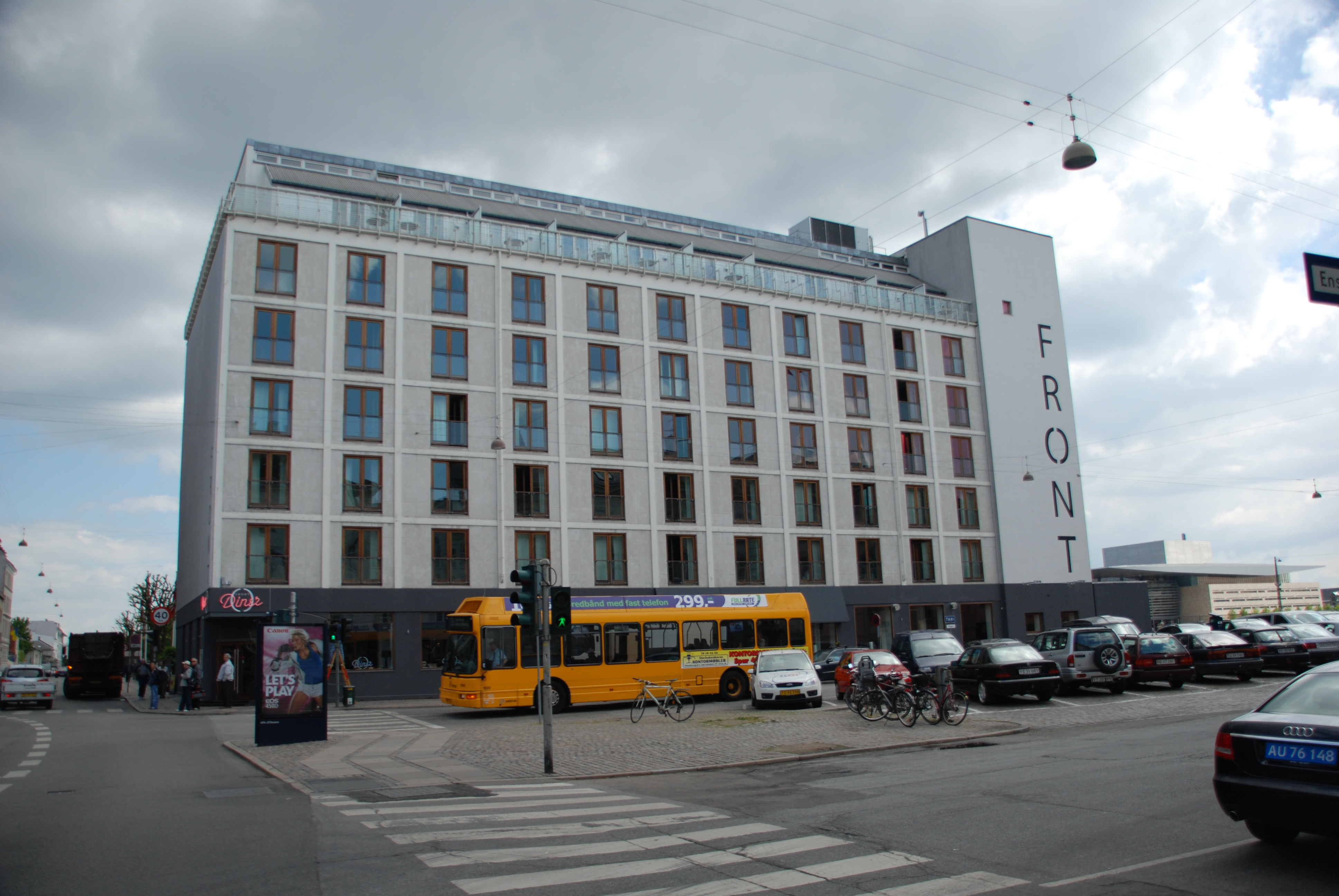 Hotel Scandic Front at Sankt Annæ Plads in Copenhagen, Denmark